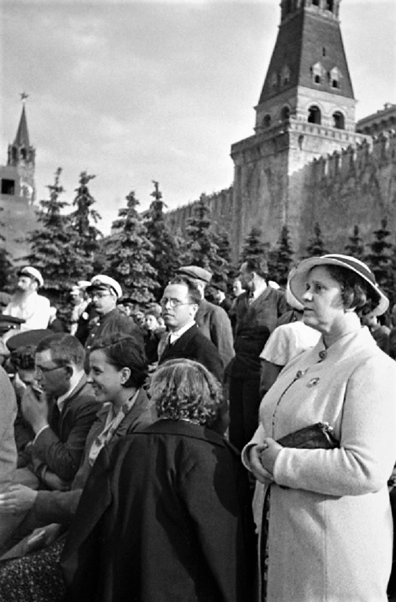 Советская певица, депутат Верховного совета СССР 1-го созыва, народная артистка СССР Валерия Барсова на Красной площади